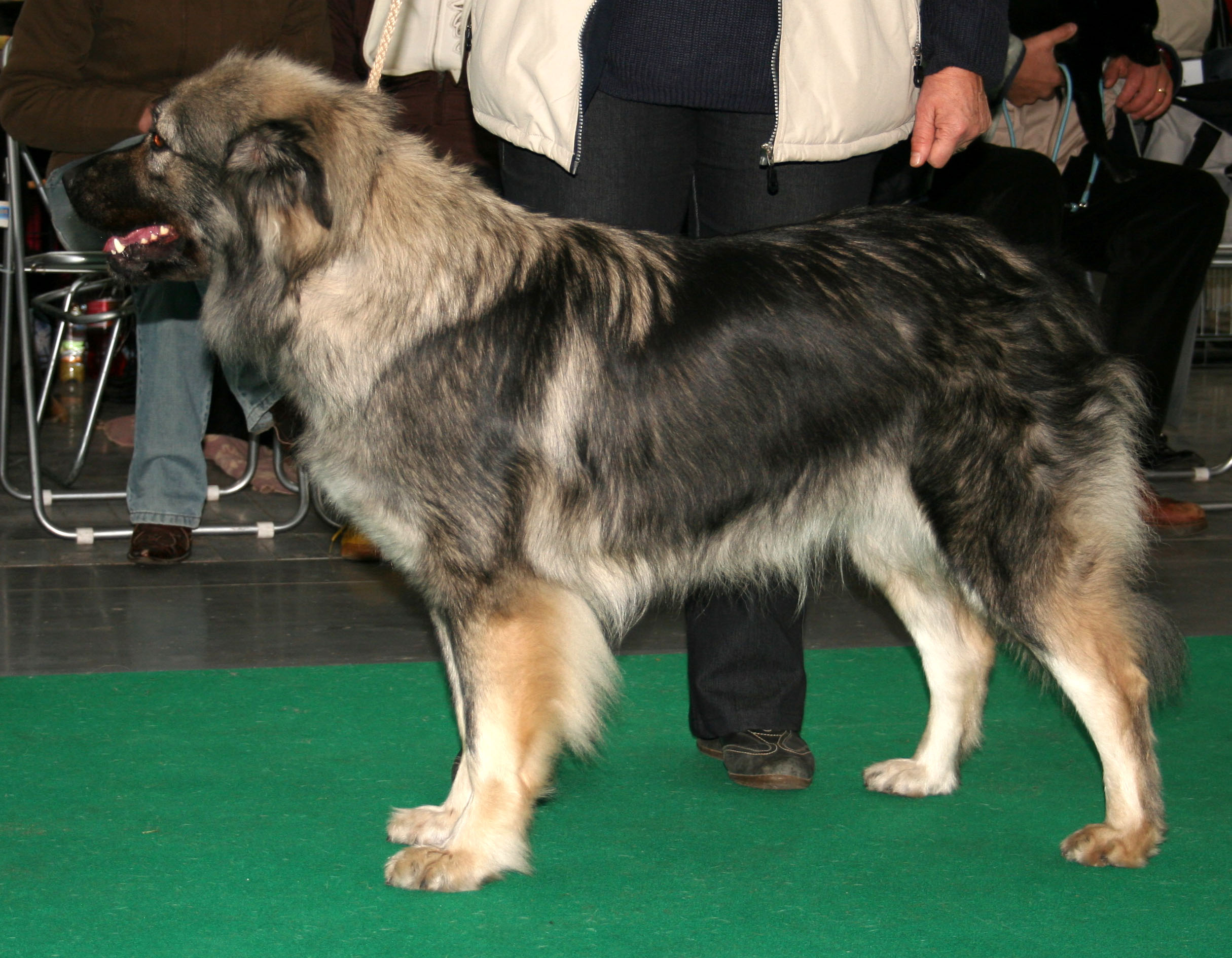 Owczarek_kraski na Światowej Wystawie Psów Rasowych w Poznaniu